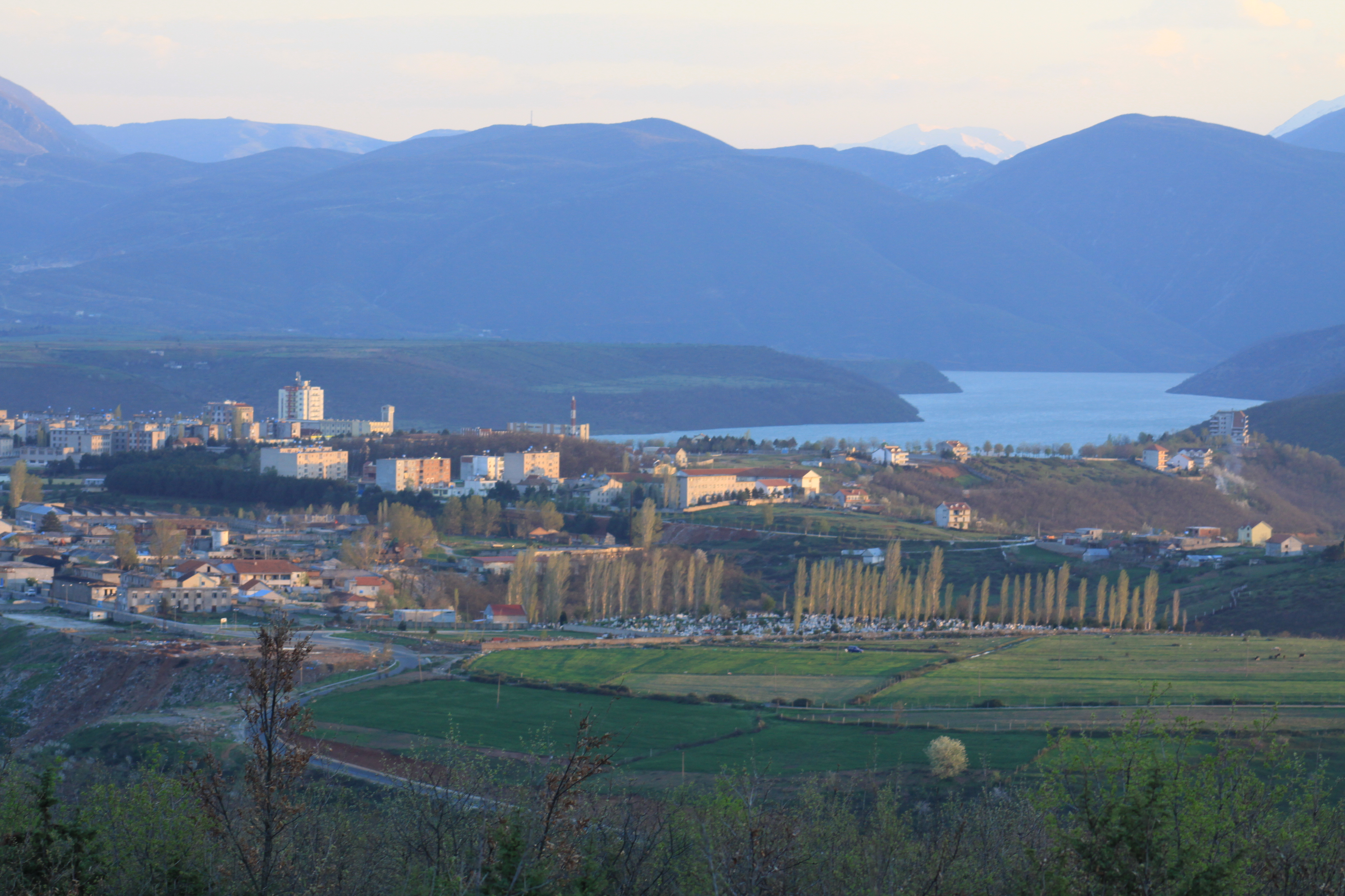 Foto e qytetit Kukes ne Qershor marre nga fshati Gjinaj